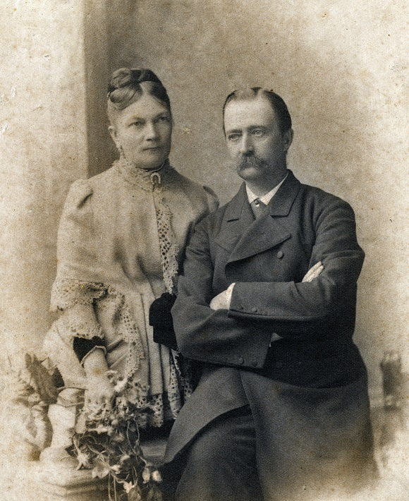 Zofia i Józef Tyszkiewiczowie